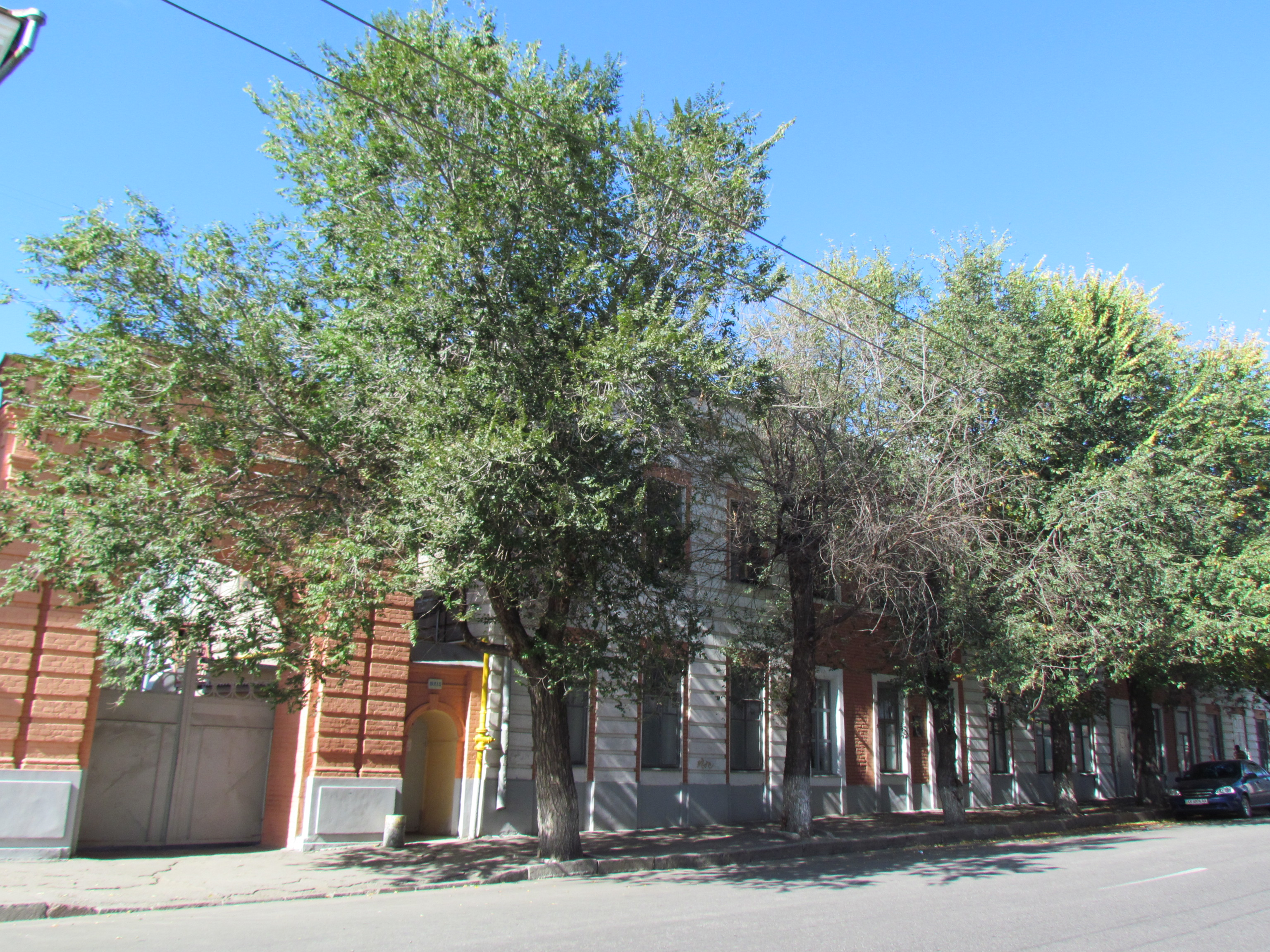 Україна, Харків, вул. Університетська, 12